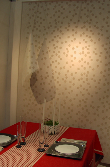 Klässbols linneväveri. Foto:Damast Kategori:Textilier